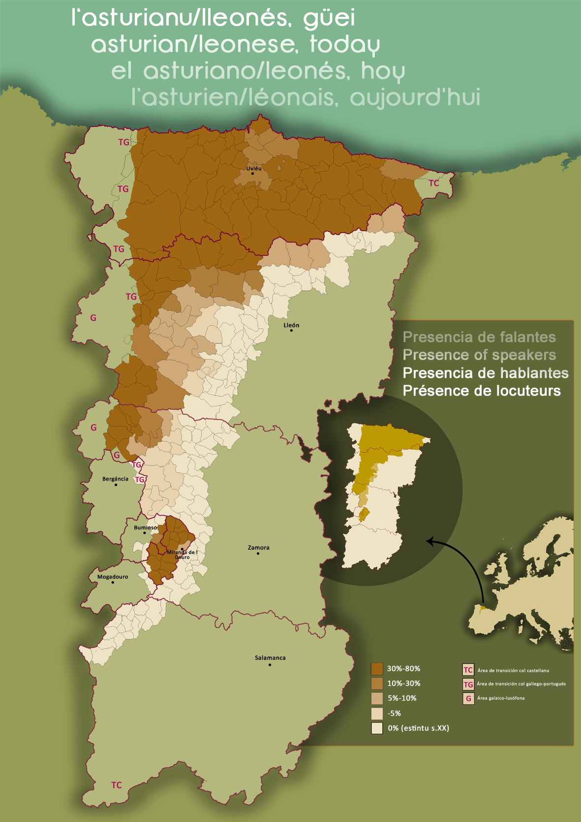 Mapa de la estensión de la llingua asturiana